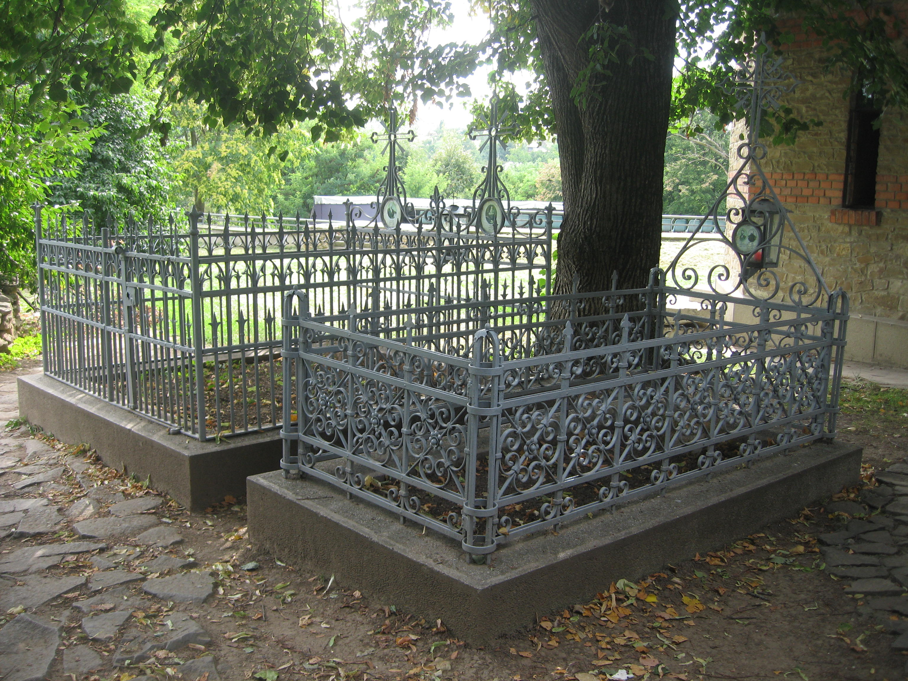 Mormintele familiei Eminescu de la biserica de lemn din Ipotești 02